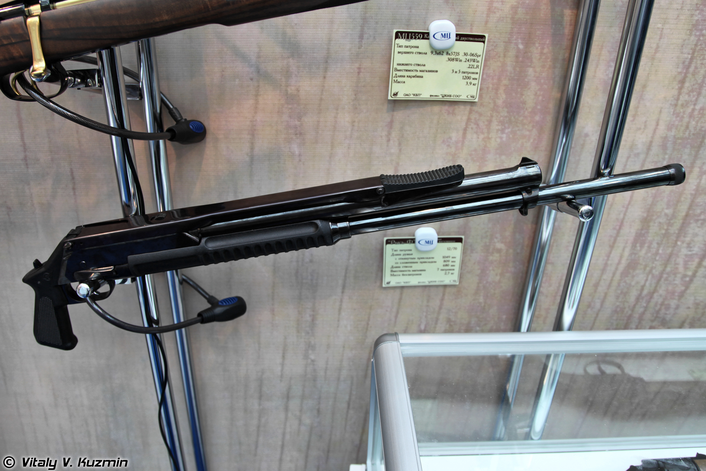 Ружье магазинное Рысь-Ф (Ris'-F shotgun)